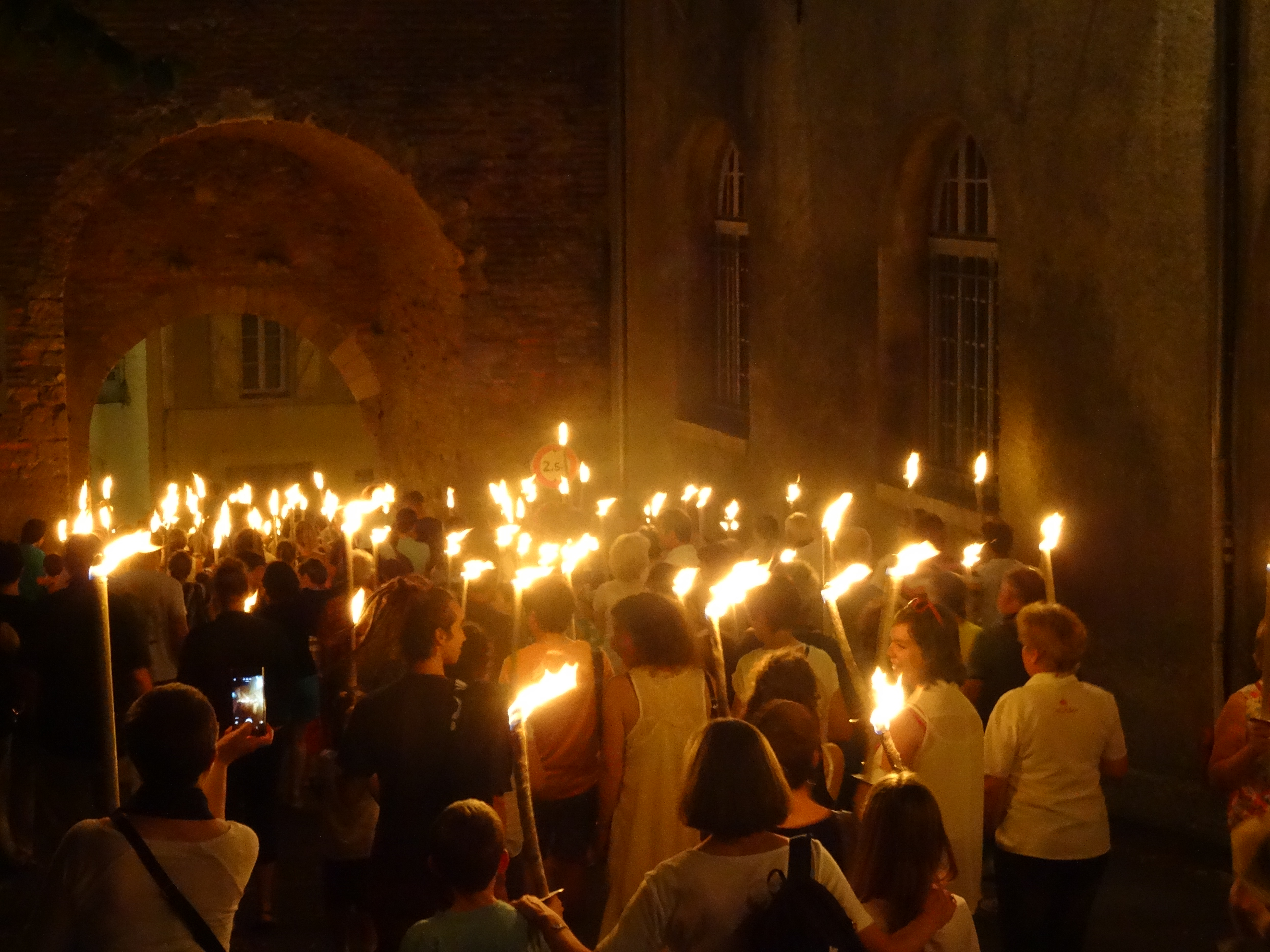 Huec de la Sent Jan de Lescar 2018 (feu de la Saint-Jean).